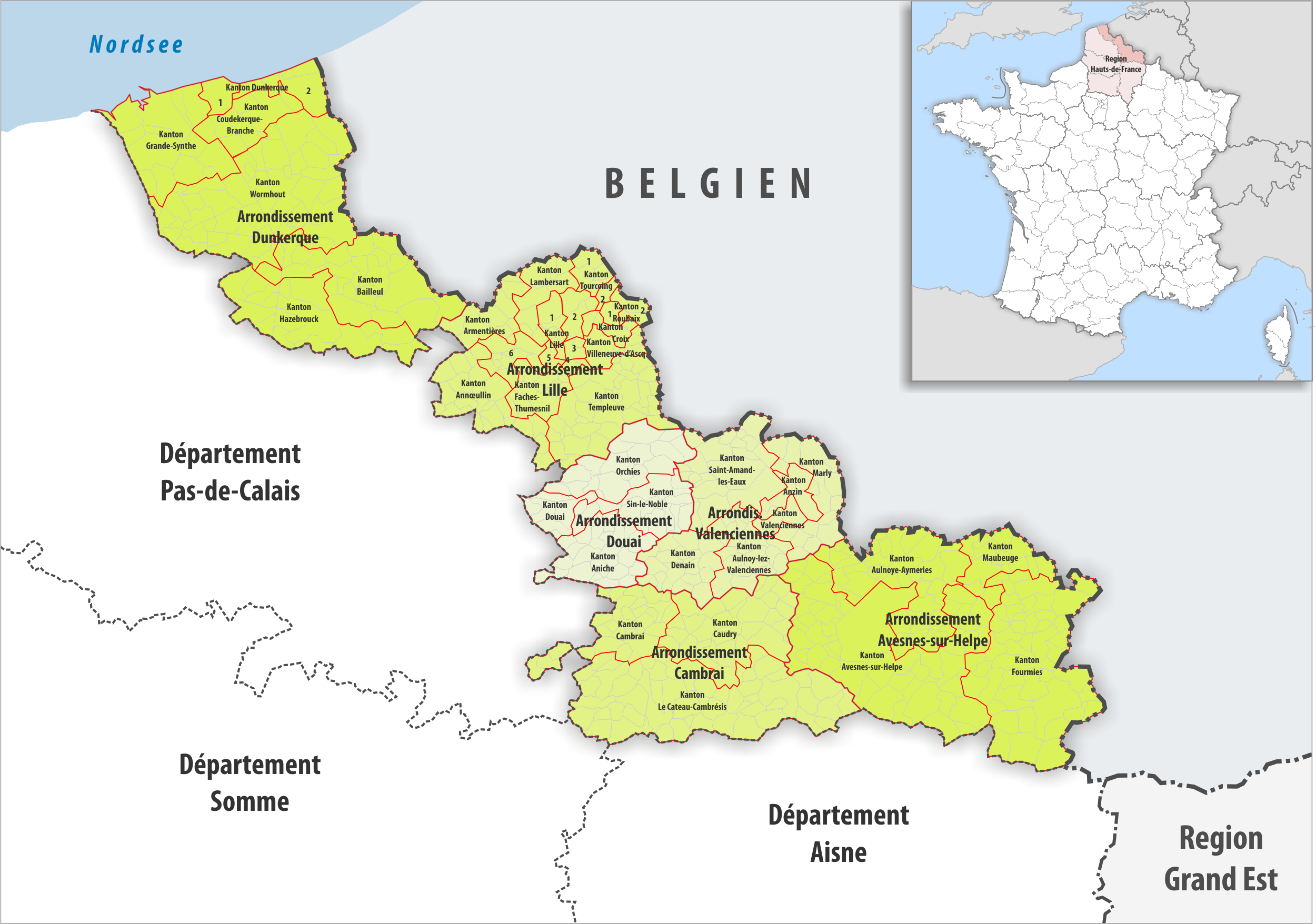 Gemeinden, Kantone und Arrondissemente im Departement Nord